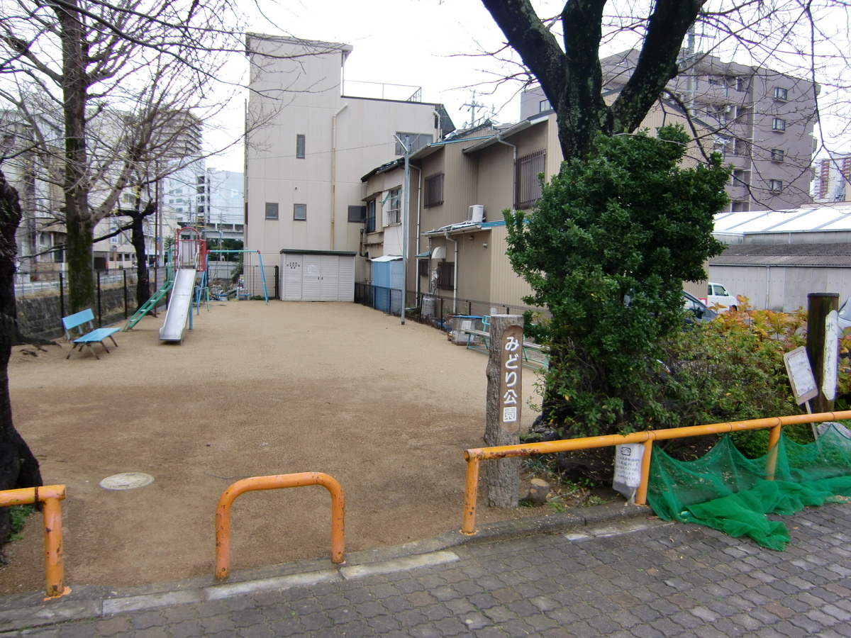 遠州鉄道奥山線 北田町駅跡。現在では公園になっており、南西の隅に「北田町停車場跡」の記念碑が建っている。